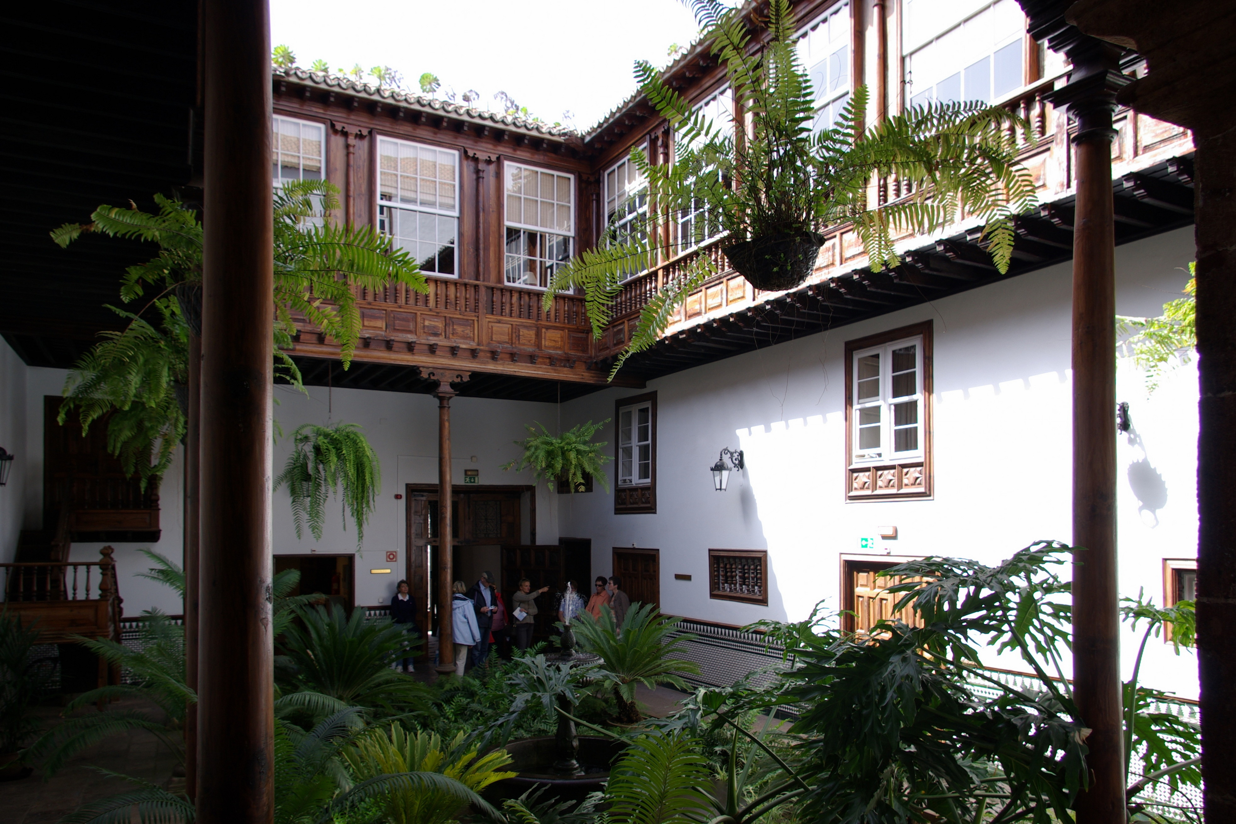 Teneriffa, La Laguna, Casa de Montañés